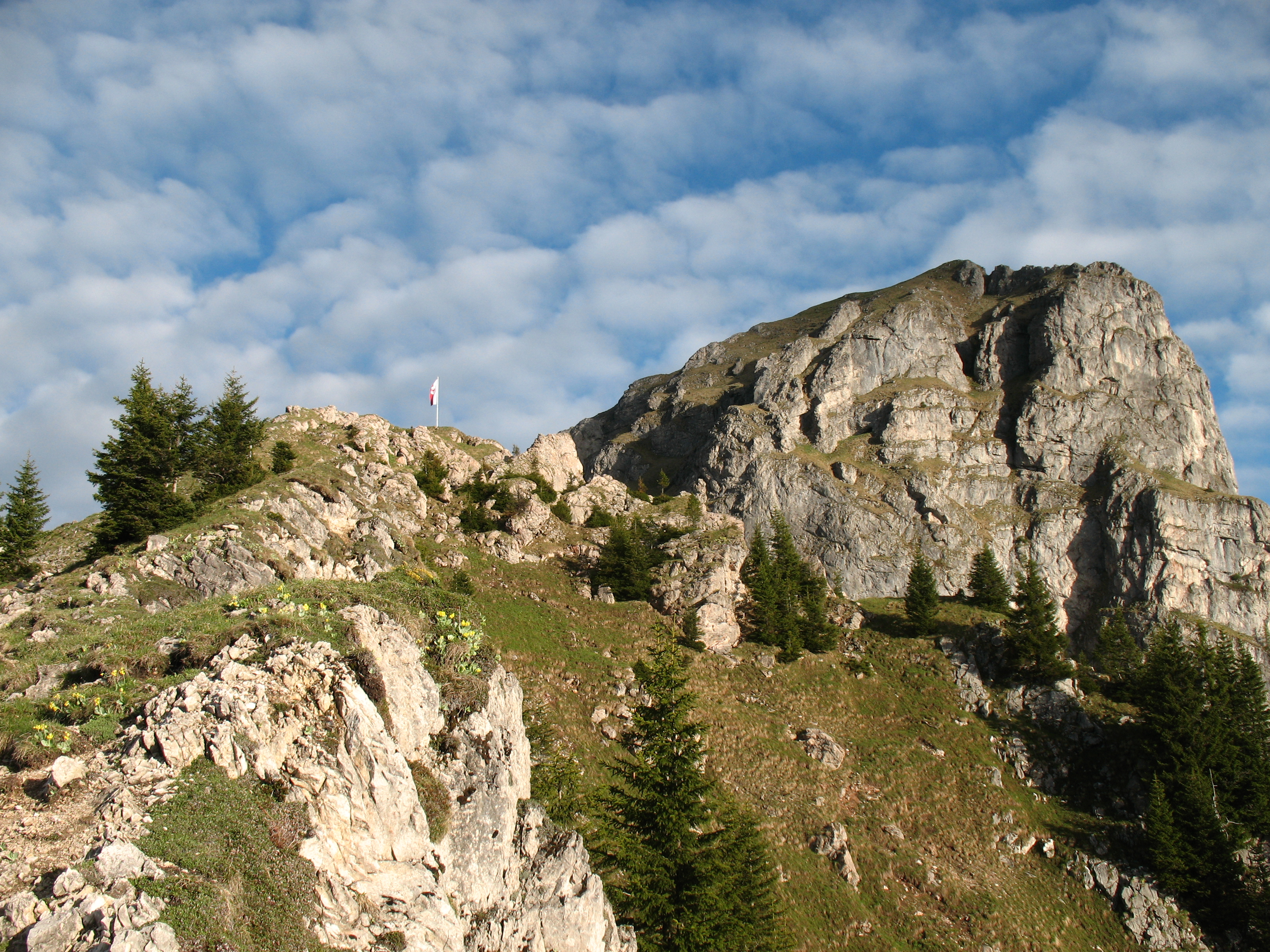 Felskopf mit Hütten-Fahne am Aggenstein nahe der Bad Kissinger Hütte.